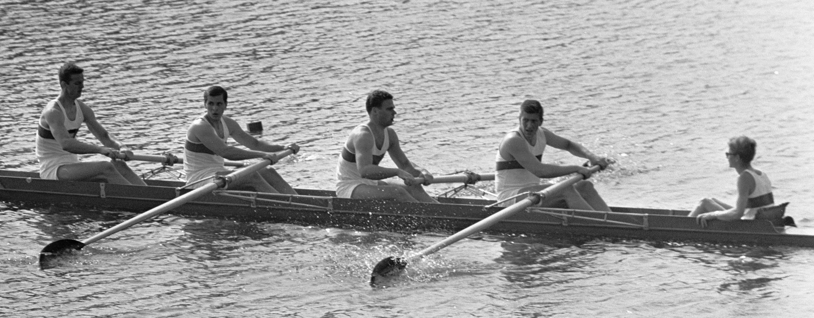 Europese roeikampioenschappen op de Bosbaan, training Duitsland 4 met stuurman ID